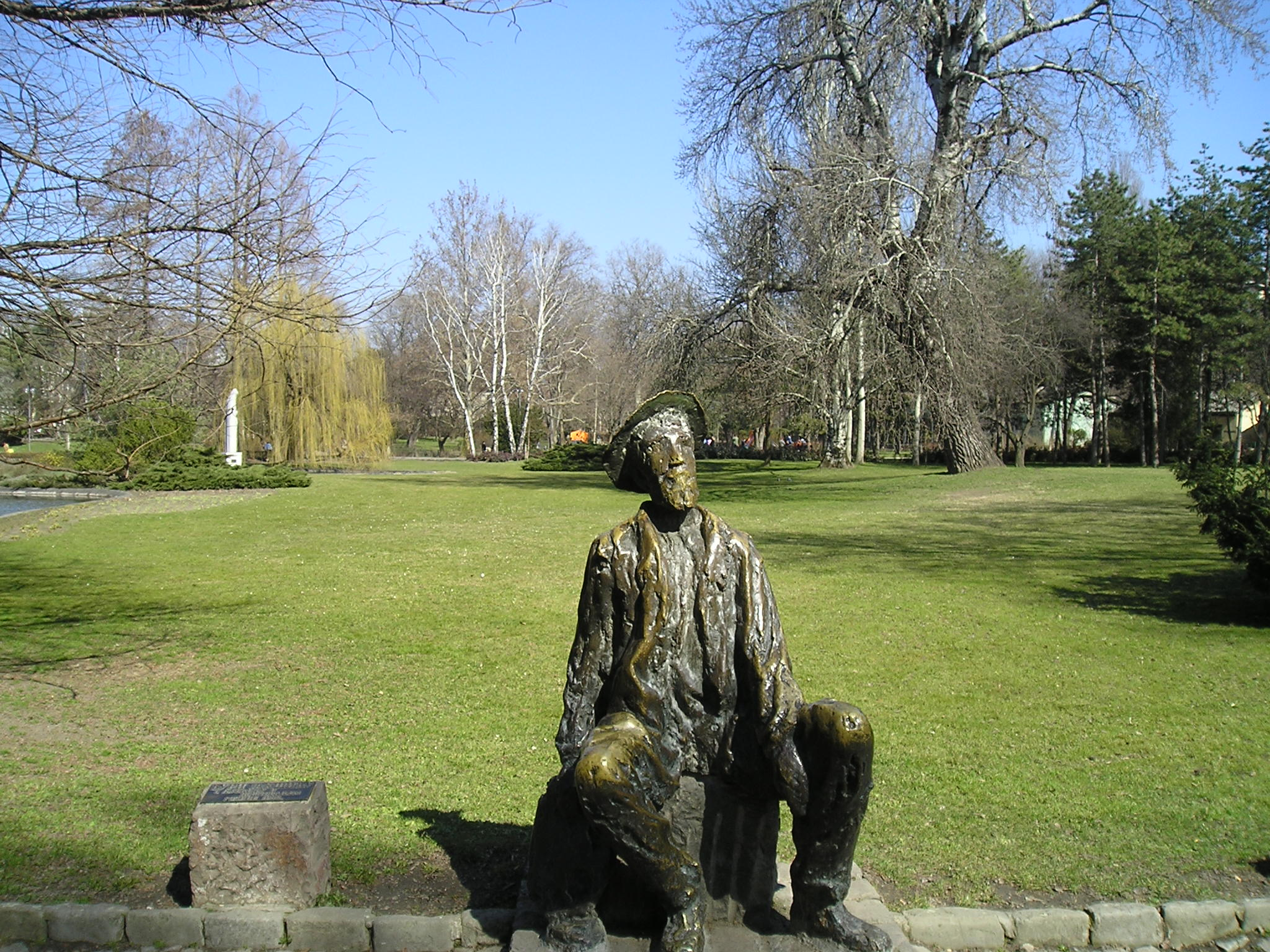 Đura Jakšić, Statue at Danube Park, Novi Sad, Serbia